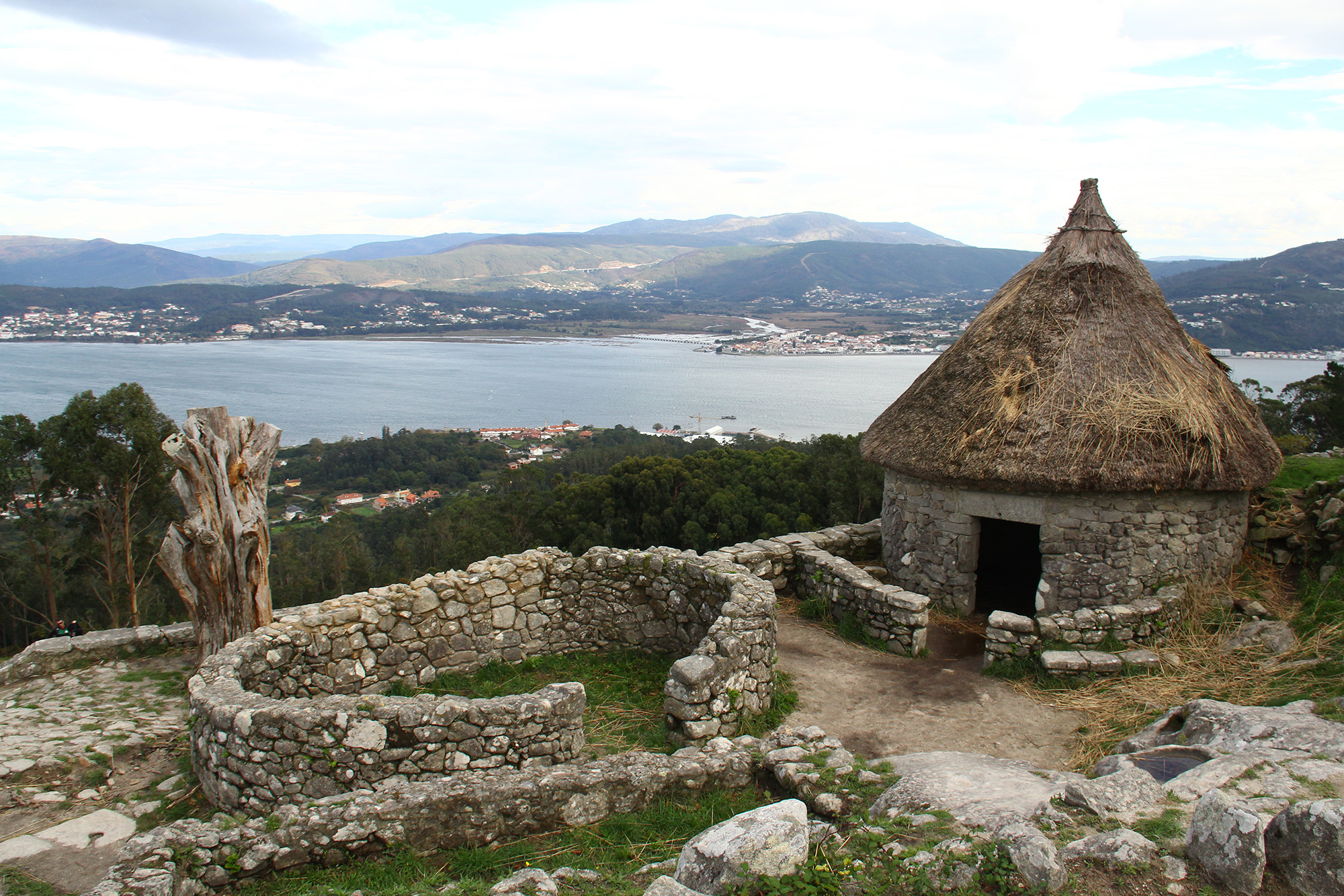 Castro del Monte de Santa Tecla (La Guardia). Galicia. España